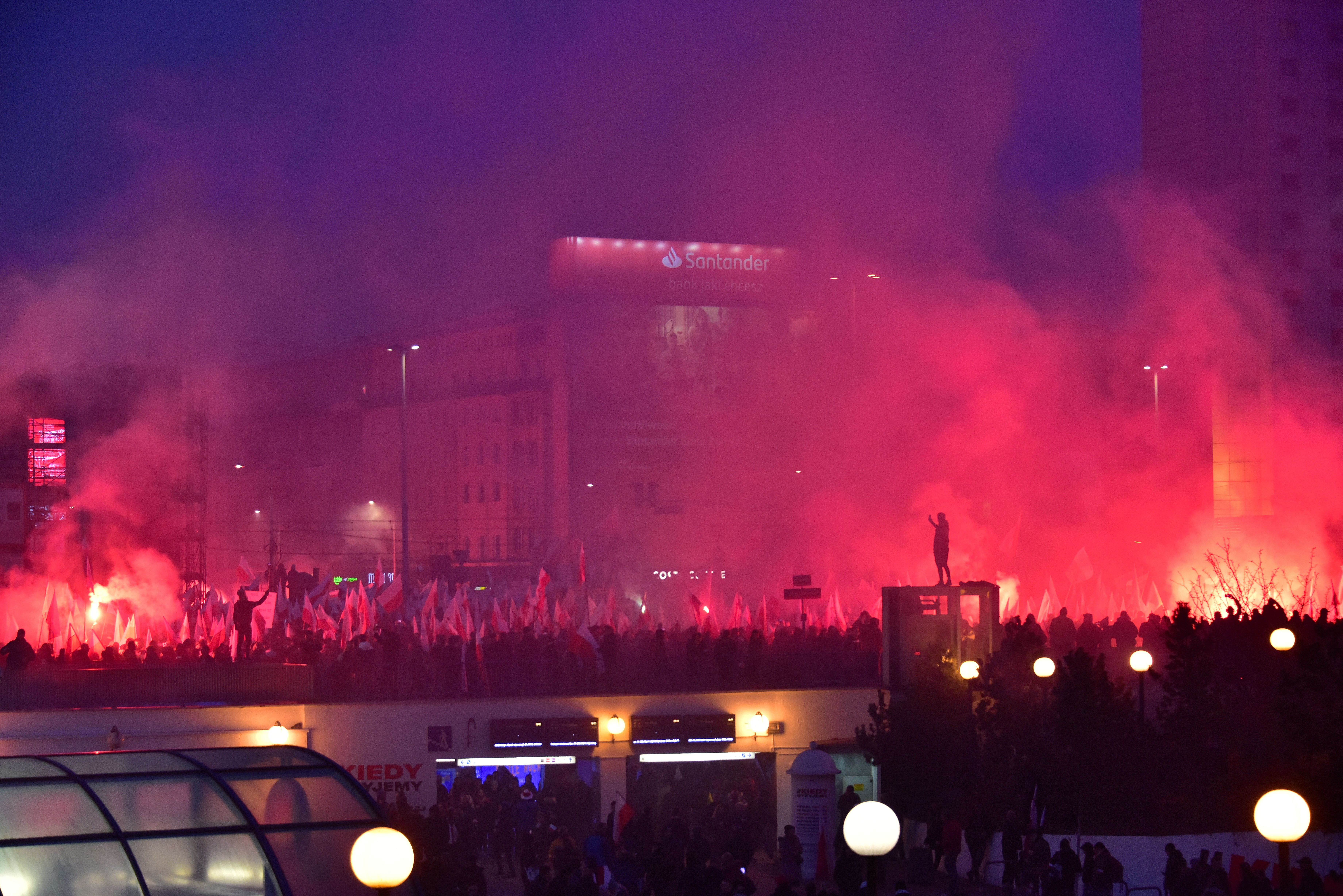 Marsz Niepodległości w Warszawie, widok z patelni w kierunku ronda Romana Dmowskiego